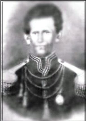 Dominio público (1789-1855)